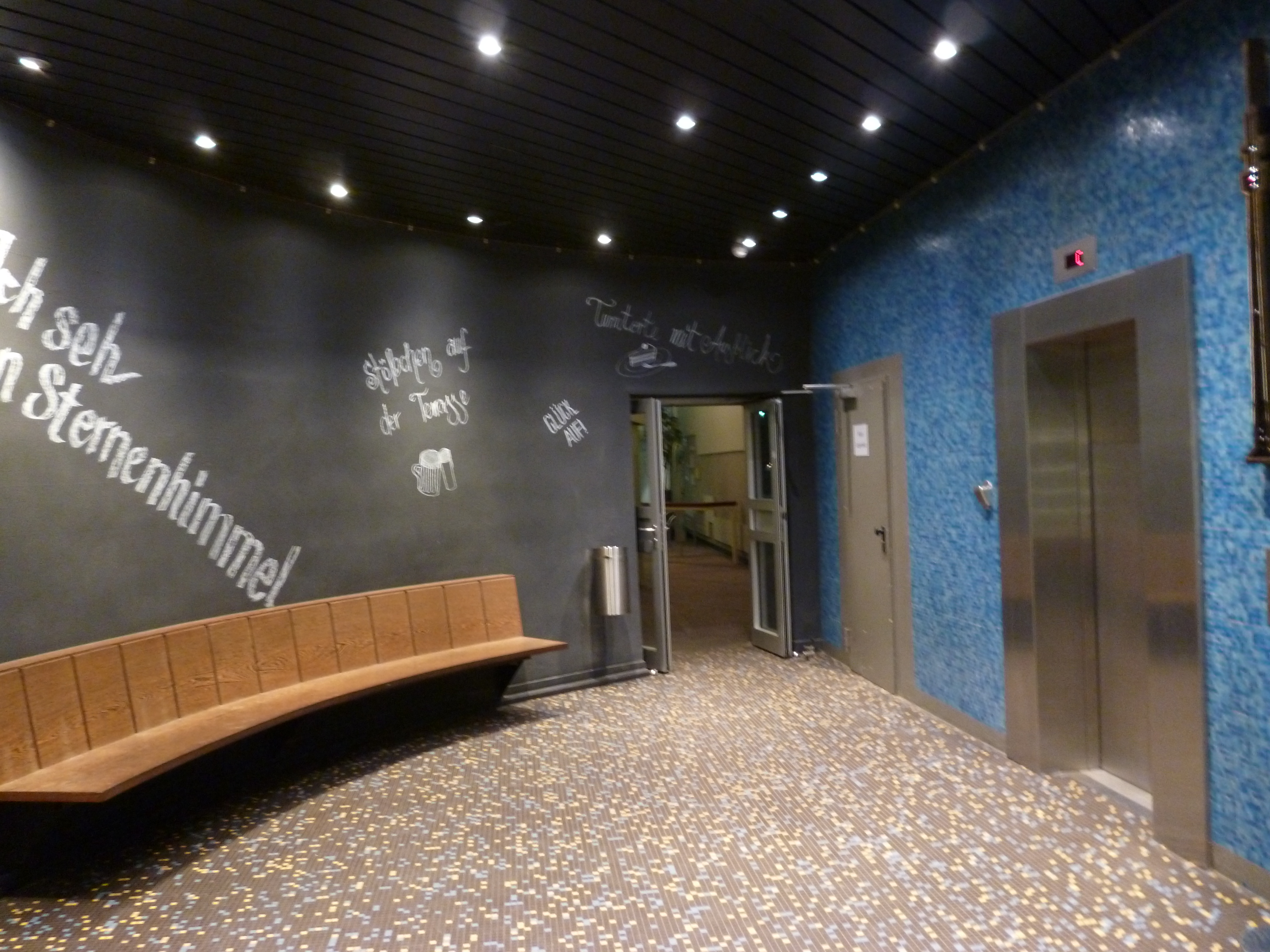 Fernsehturm Dortmund Vorraum EG mit Fahrstühlen